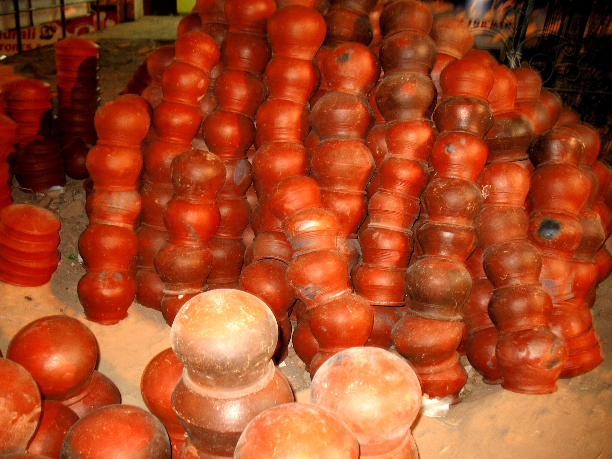 ആറ്റുകാൽ പൊങ്കാലയ്ക്കായ് വില്പനയ്ക്കു അടുക്കി വച്ചിരിക്കുന്ന മൺകലങ്ങൾ